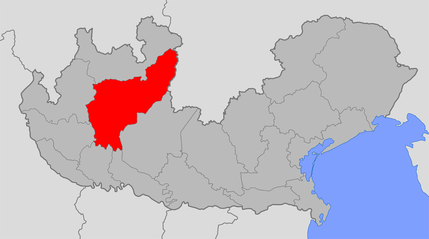 La provincia di Bergamo nel Regno Lombardo-Veneto (1816-1859)